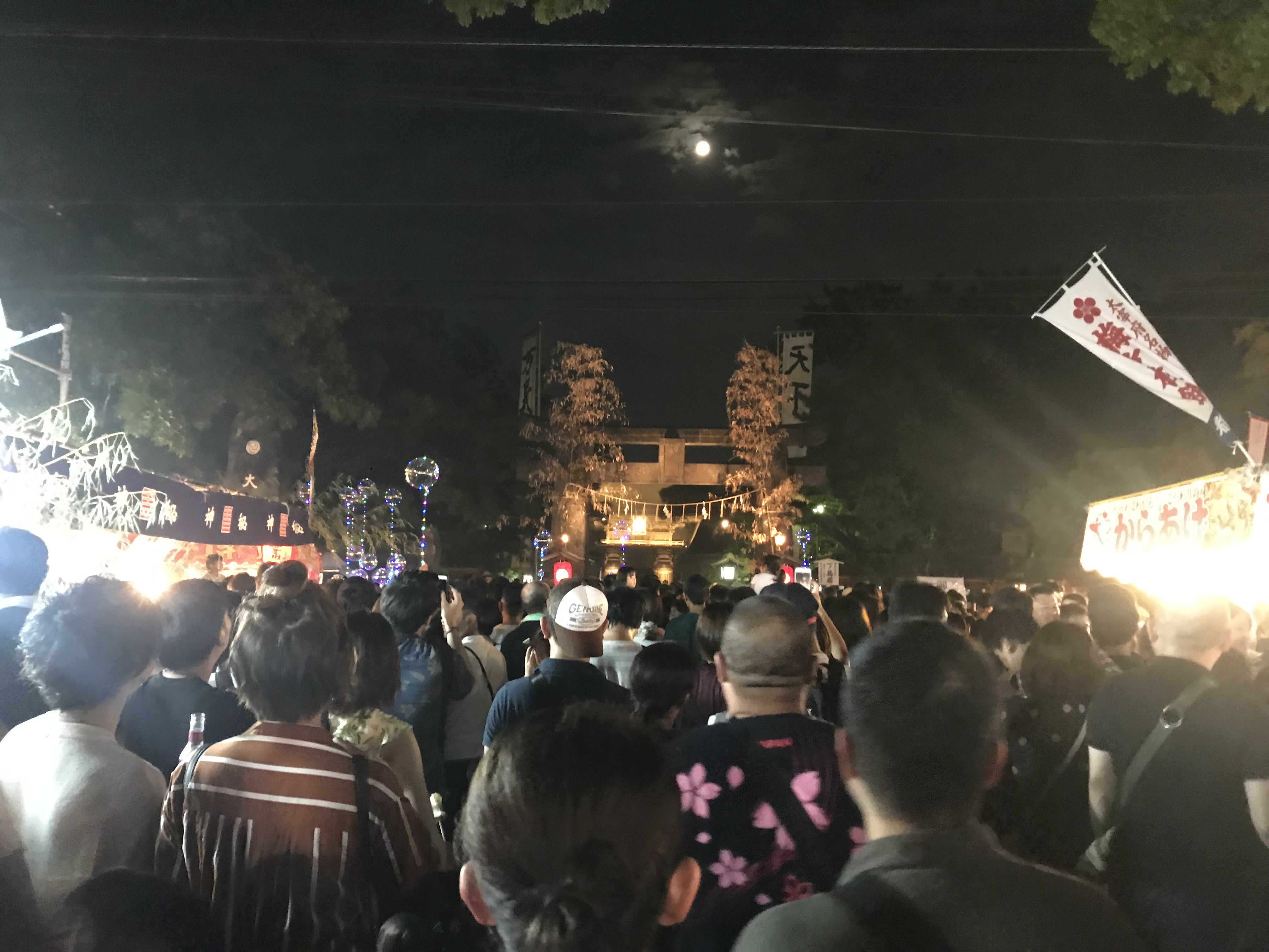 筥崎宮放生会